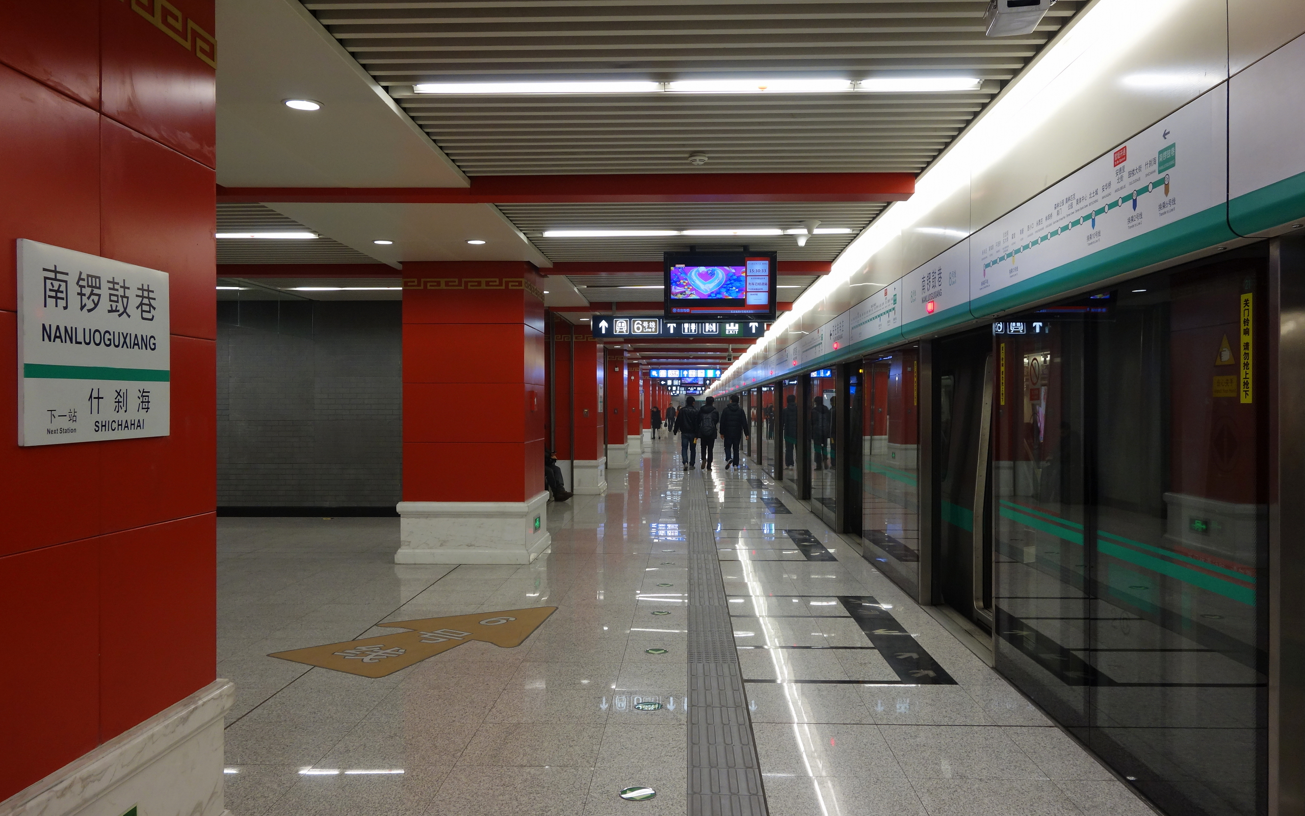 北京地铁8号线南锣鼓巷站往朱辛庄站方向站台